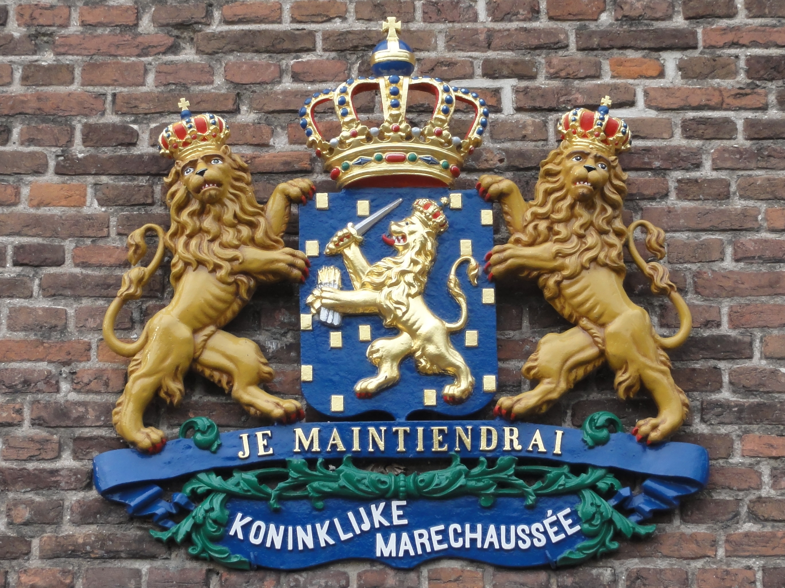 Wapen Marechaussee op de gevel van het Museum der Koninklijke Marechaussee in Buren